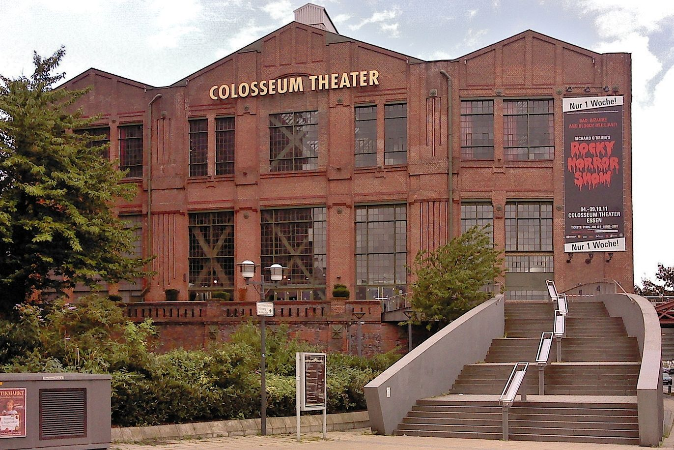 Denkmalgeschützte Krupp-Werkshalle im Essener Westviertel; ehem. 8. Mechanische Werkstatt, heute Colosseum Thater